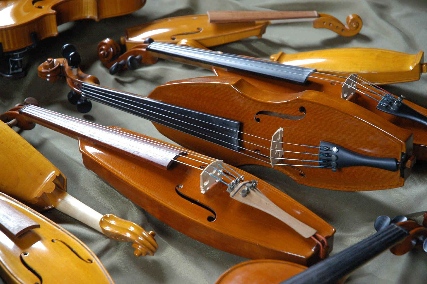 Gęśliki góralskie (złóbcoki) wykonane przez Mariana Styrczula-Maśniak